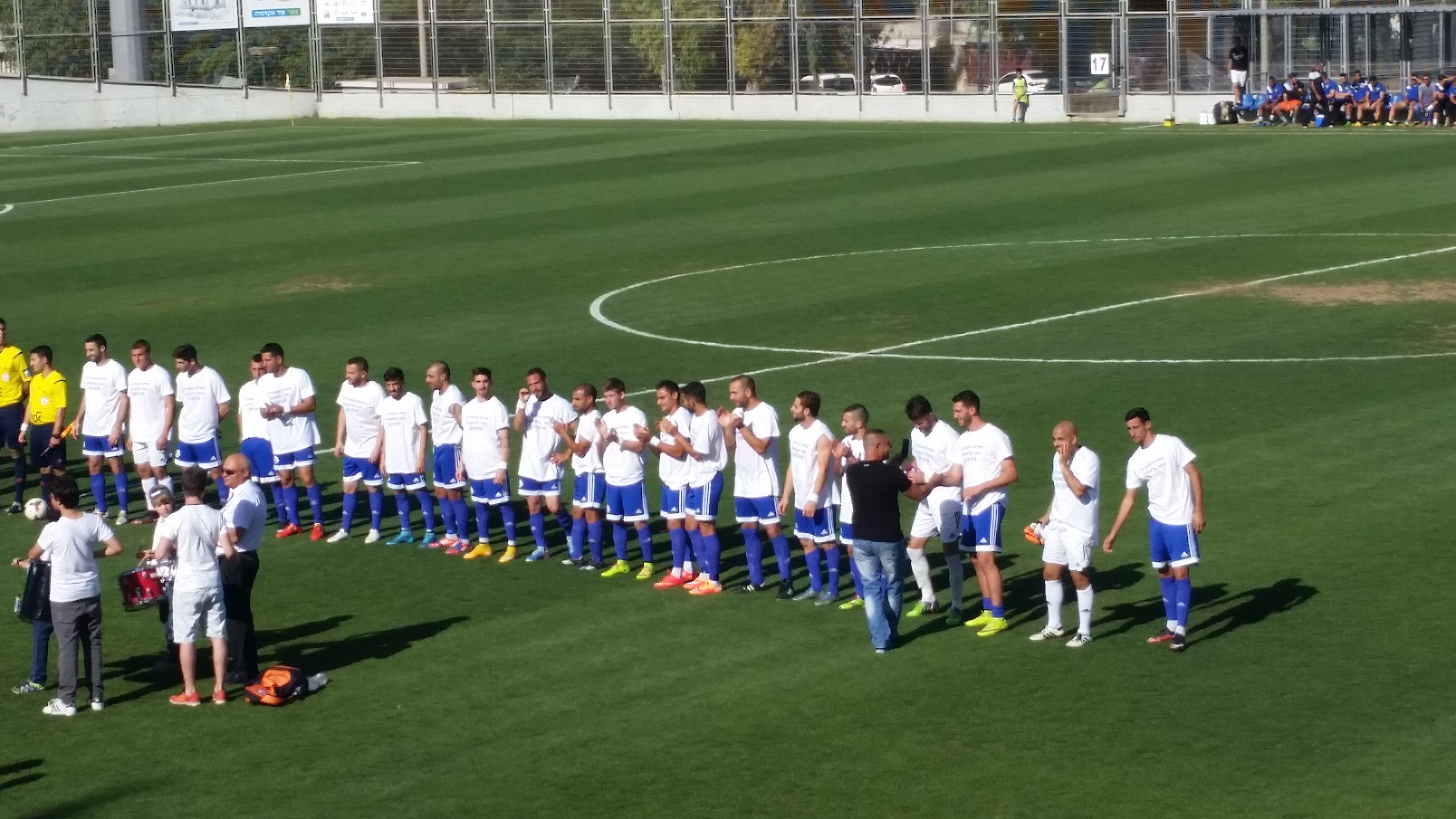 קבוצת כדורגל עירוני נשר במשחק הכתרה של סיום העונה בליגה א צפון ועלייה לליגה הלאומית. משחקת מול הפועל צור שלום